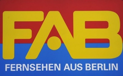 Letztes Logo des FAB